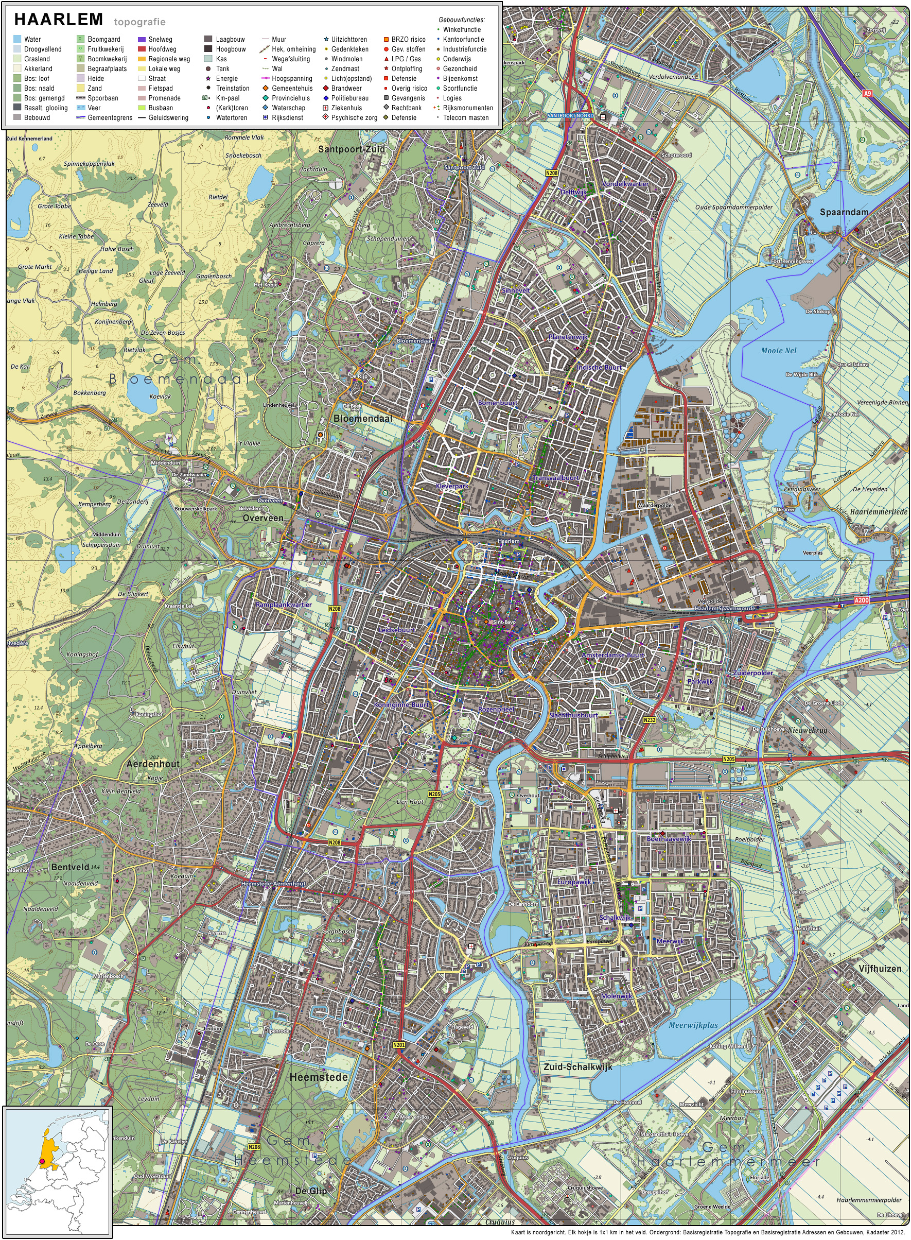 Topografisch beeld van de stad Haarlem. Op basis van de GML open geodata van de BRT/Top10NL (basisregistratie Topografie, Kadaster 2012), vrijgegeven door Kadaster op 30-11-2012 onder de Creative Commons BY licentie. Gebouwvlakken vanuit Open Geodata BAG extract (december 2012). Samenstelling en kleurenschema: Jan-Willem van Aalst, met QuantumGIS en Photoshop.